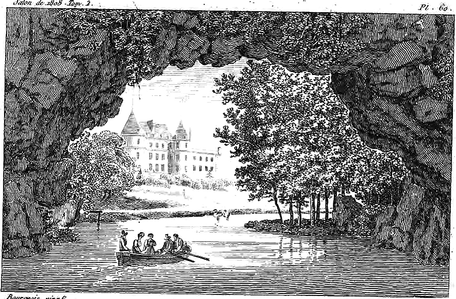 Château_de_Méréville_et_son pont de roches,_vue_des_jardins__dessin_de__M._Bourgeois_(Salon_de_1808)